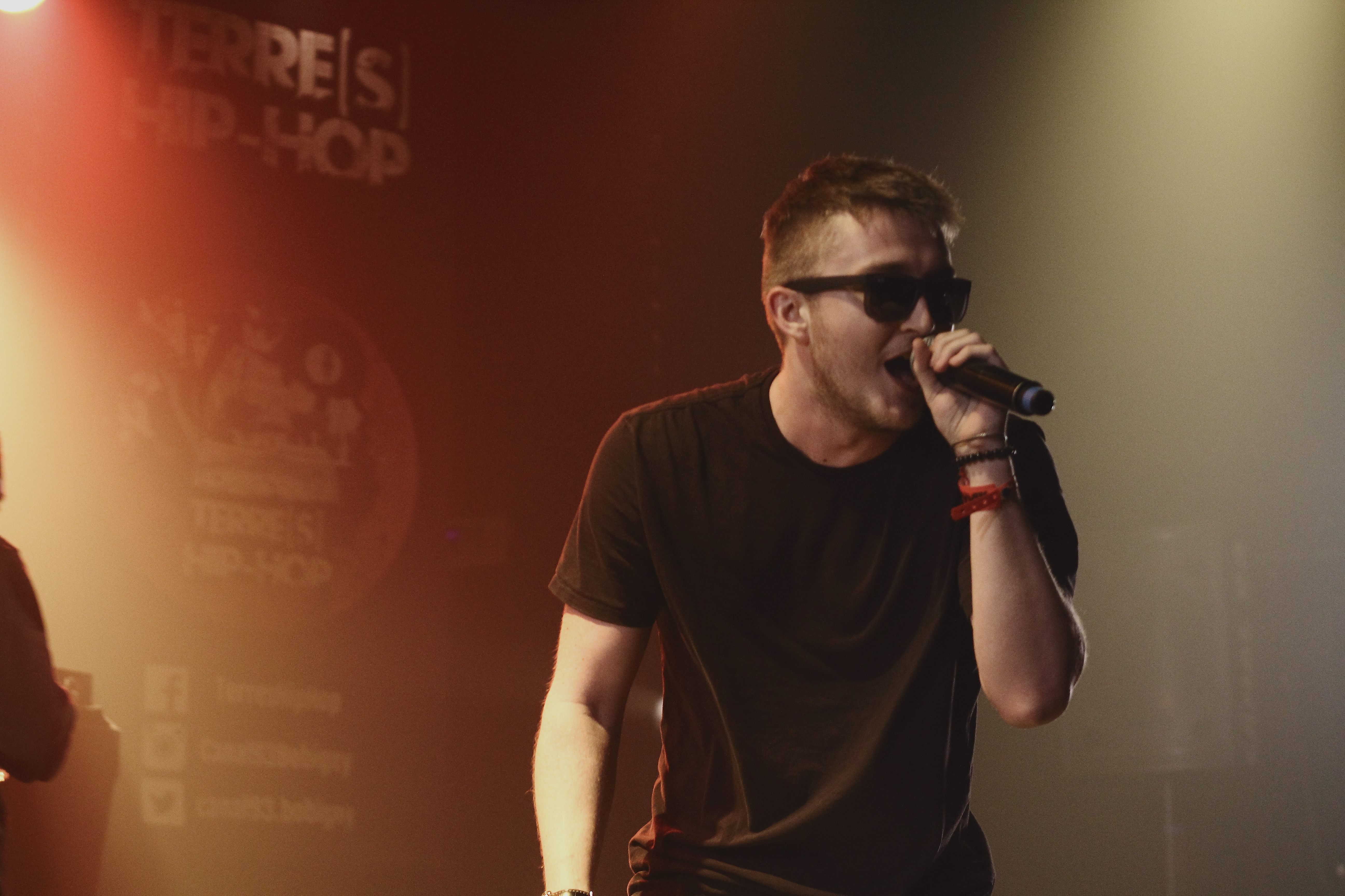 Vald, lors du Terre(s) Hip Hop 2015.